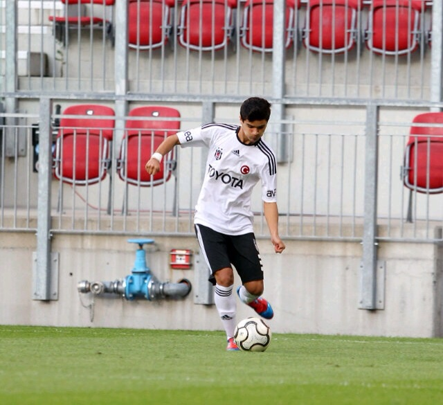 Ümit Karaal Besiktas formasıyla